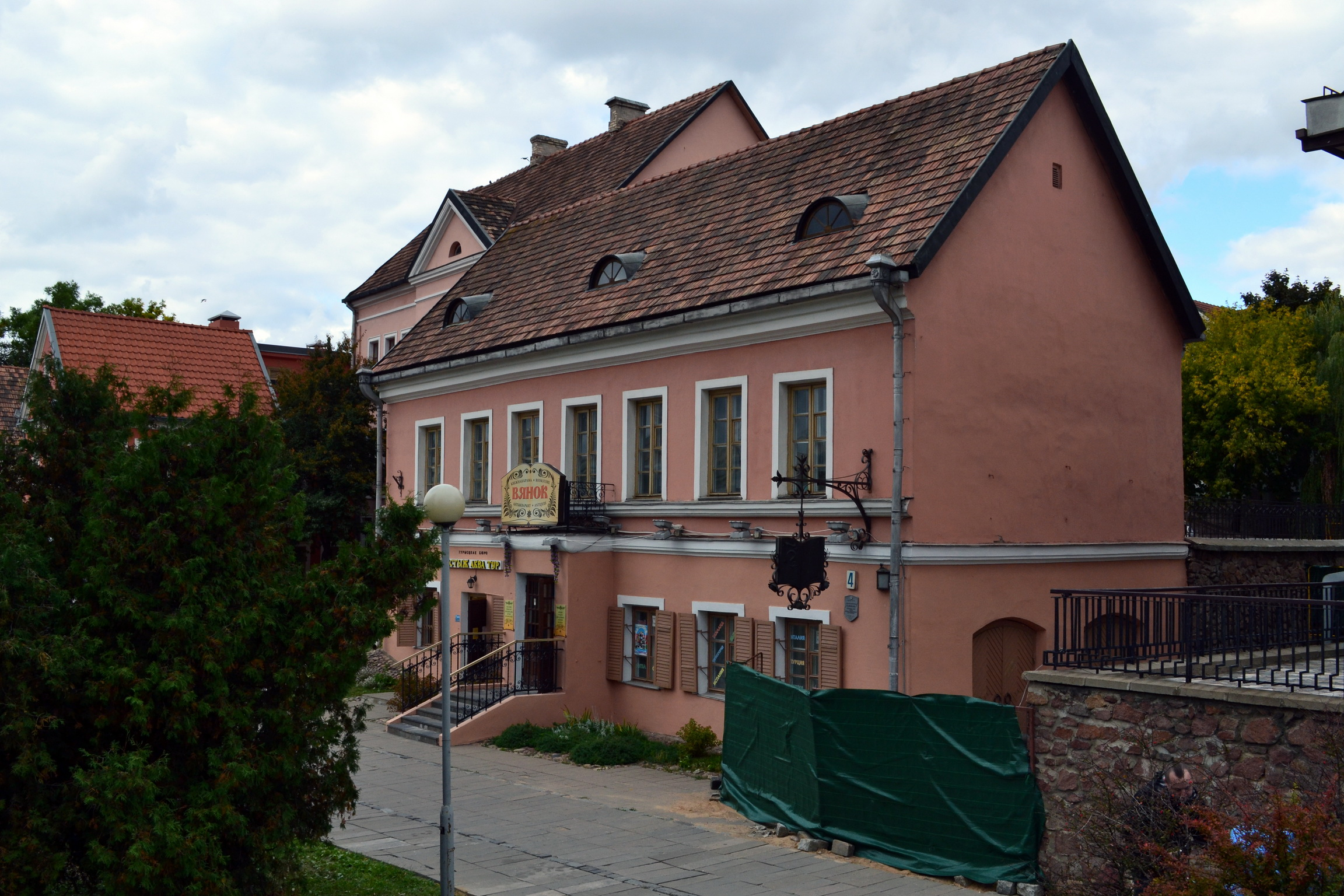 Беларуская (тарашкевіца): Гістарычны цэнтар Менску: цацачныя хаткі ў Траецкім прадмесьці This is a photo of Belarusian heritage monument. Reference number: 711Е000001 ( WLM)